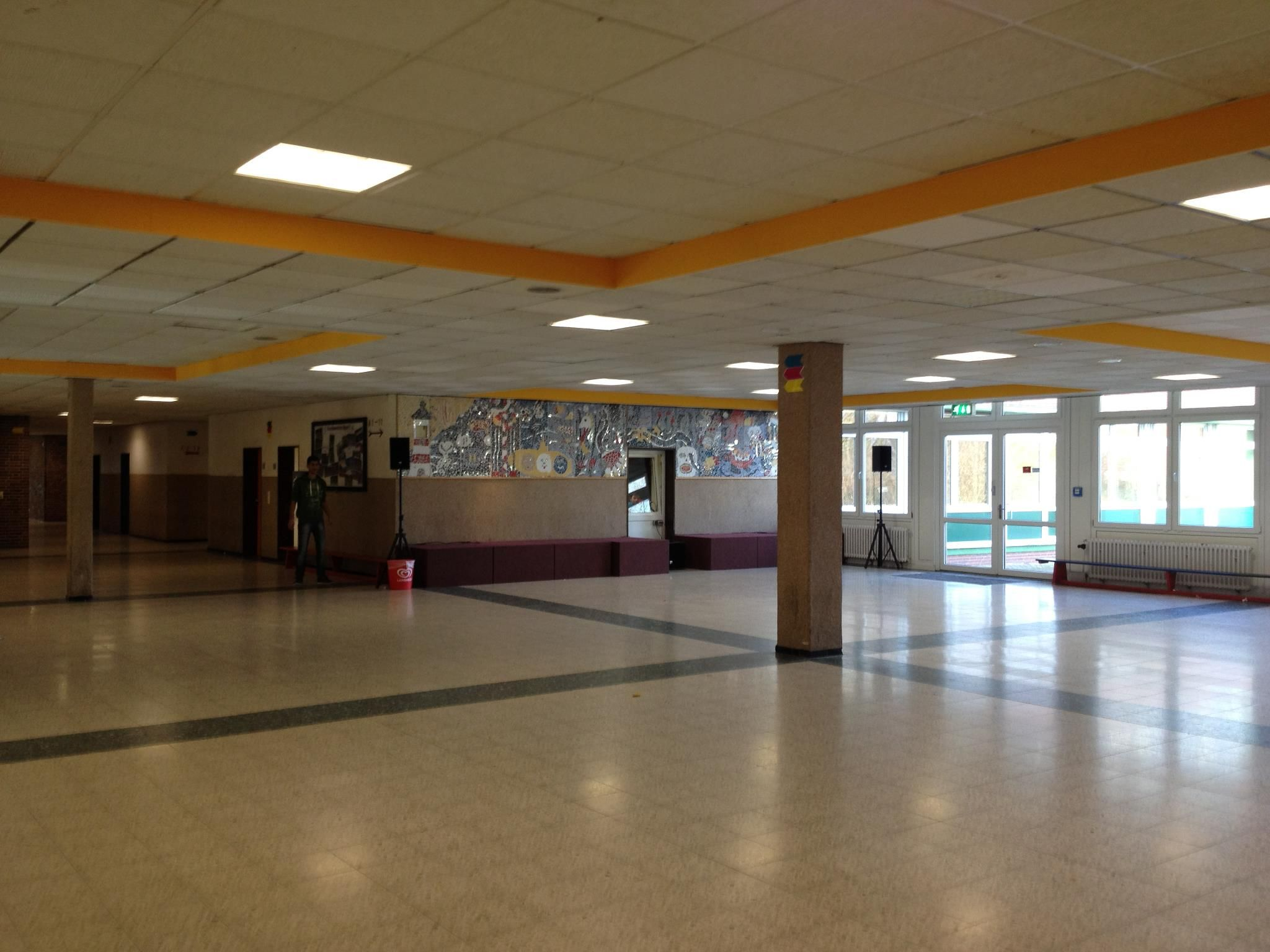 Die Pausenhalle der KGS Wittmund mit dem Pausenradio.